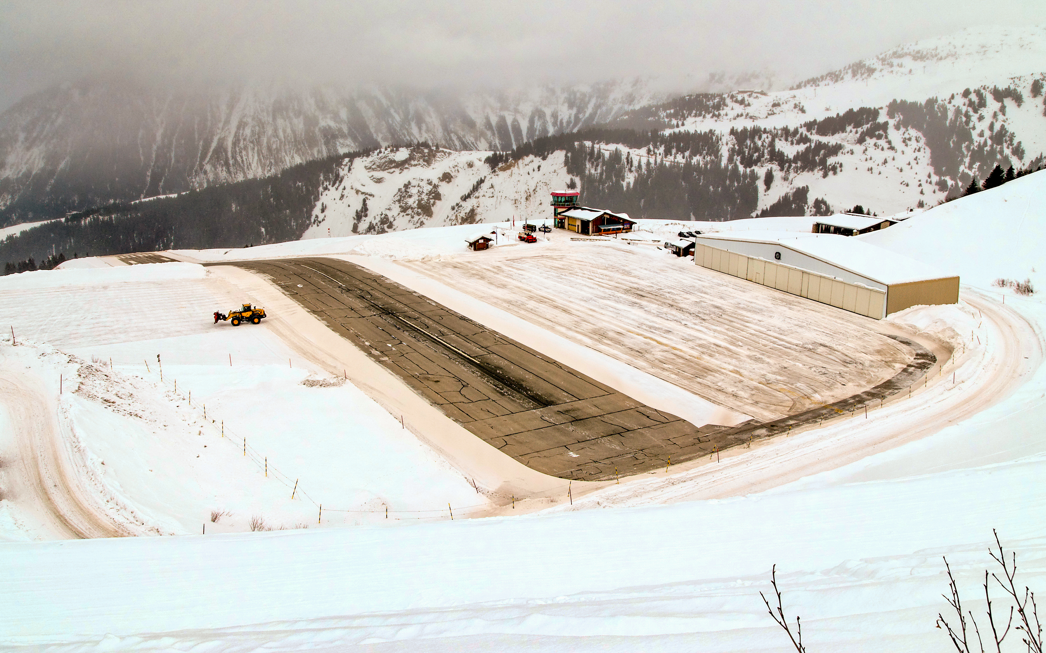 aéroport de Courchevel en hiver